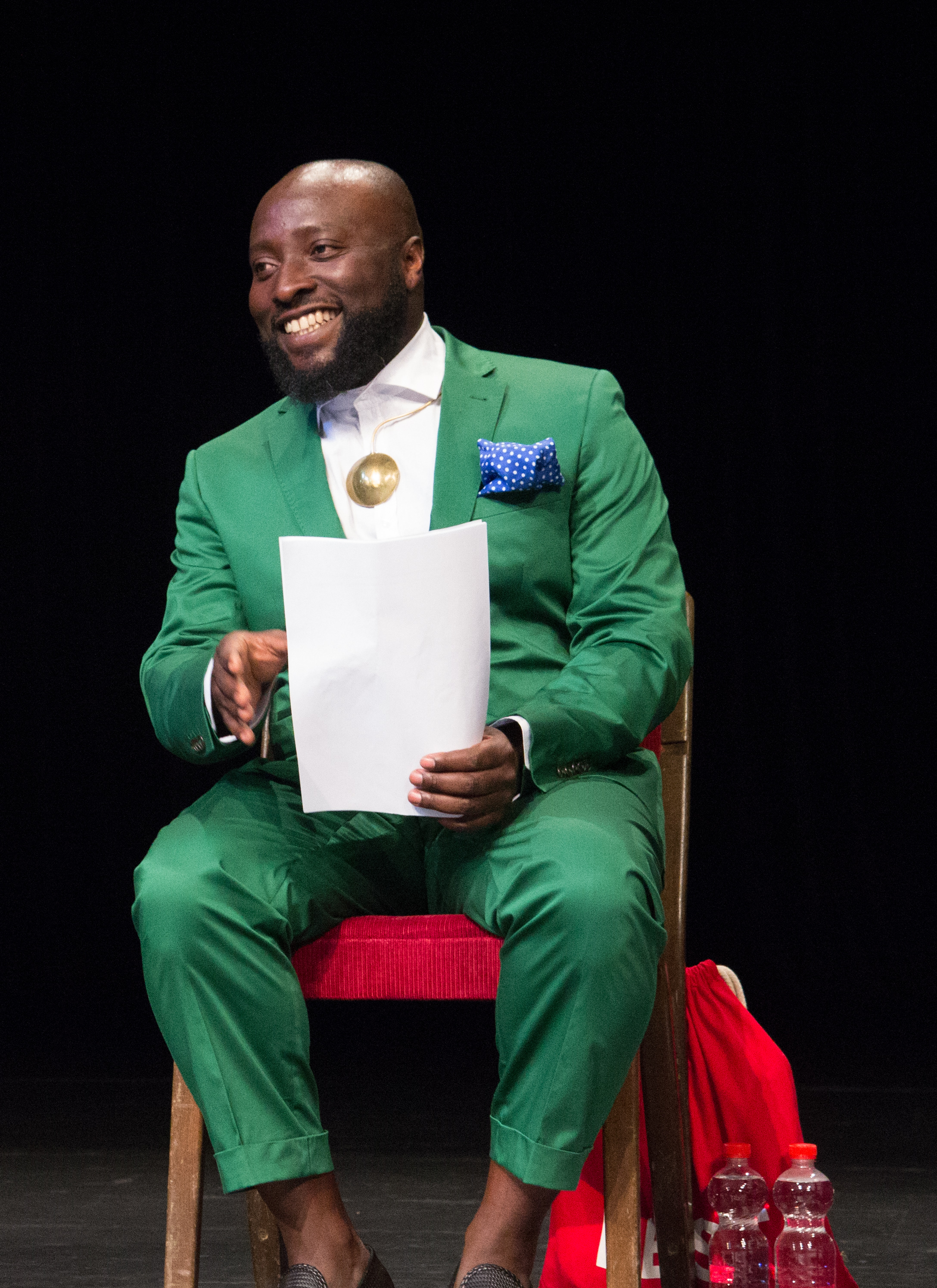 Documenta 14 in Kassel: Eröffnungskonferenz der Documenta 14 am 7. Juni 2017 in Kassel